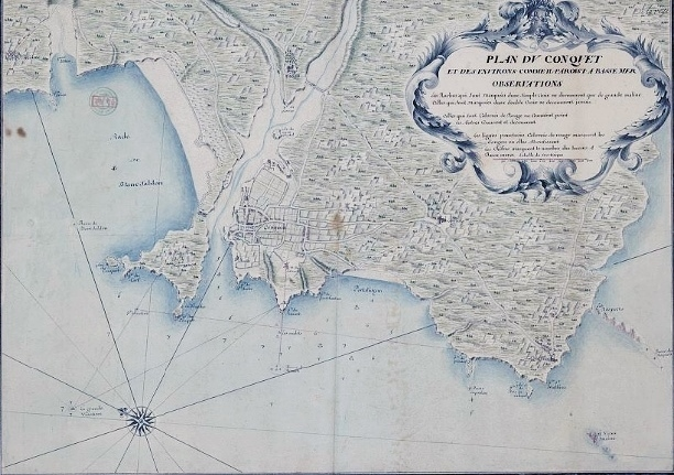 Plan du Conquet et des environs par Denis de la Voye (décédé en 1708).